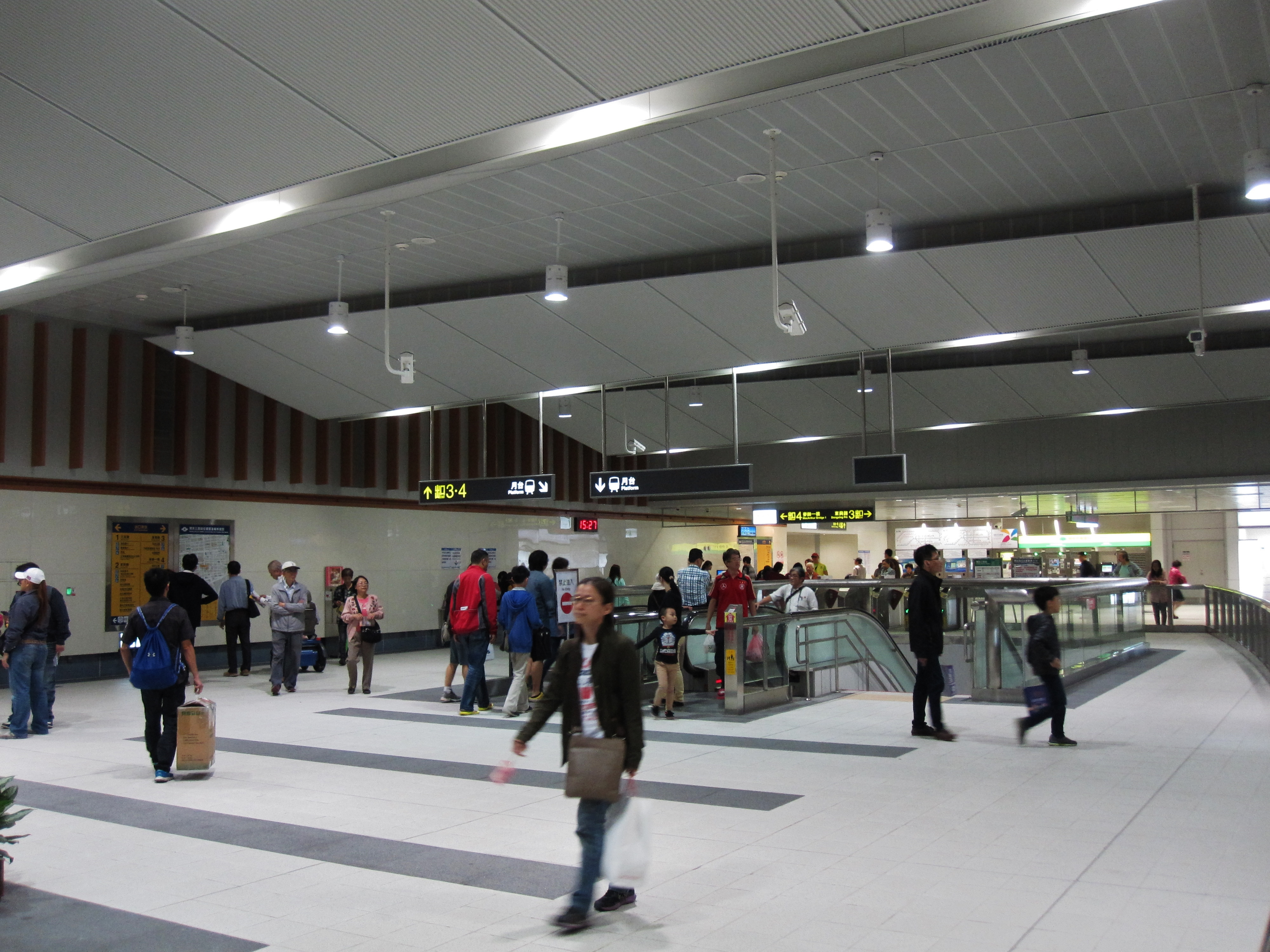 中文（台灣）: 捷運松山線南京三民站穿堂層